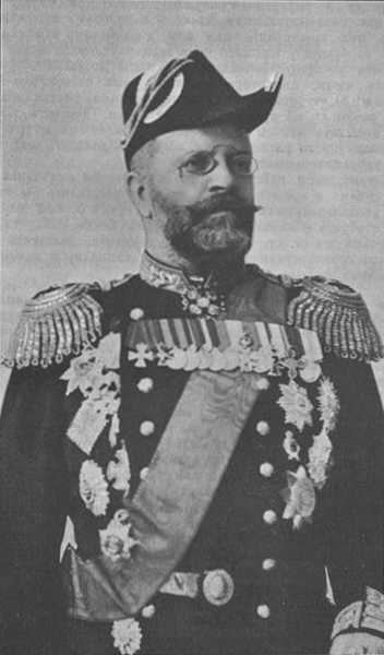 Николай Илларионович Скрыдлов, вице-адмирал, командующий флотом в Тихом океане.